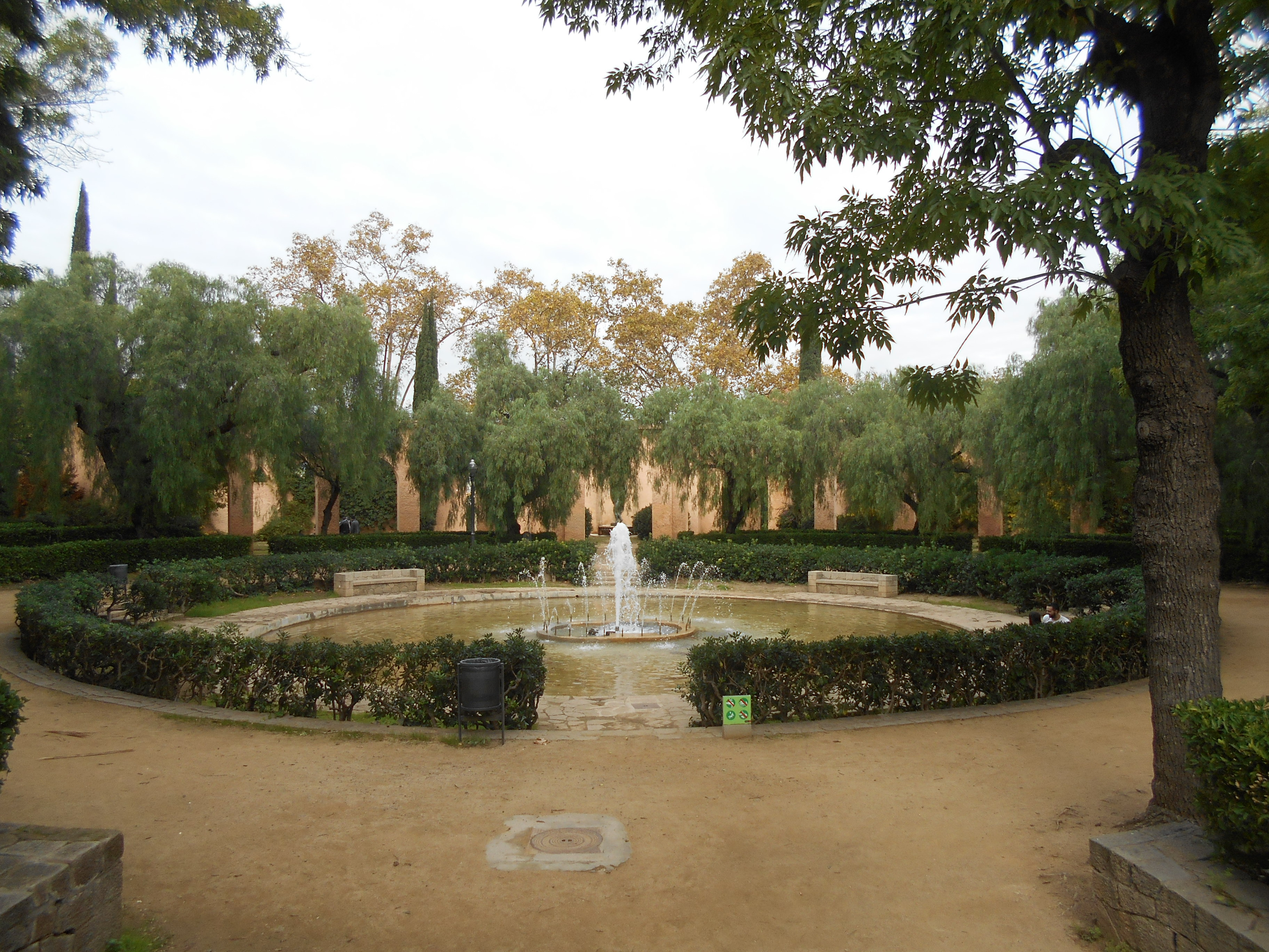 Jardines del Umbráculo, Montjuïc.